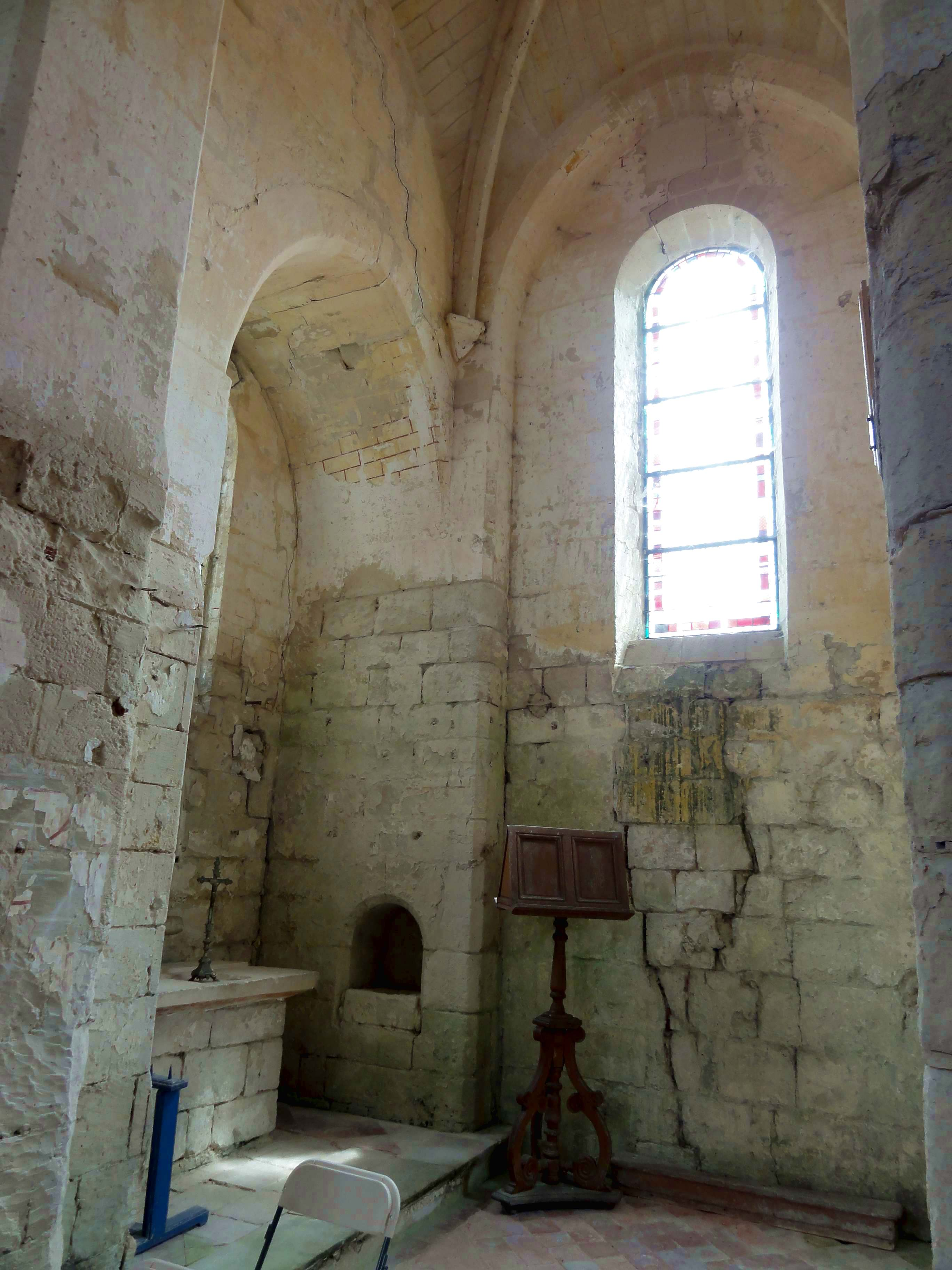 Intérieur de l'église (voir titre).